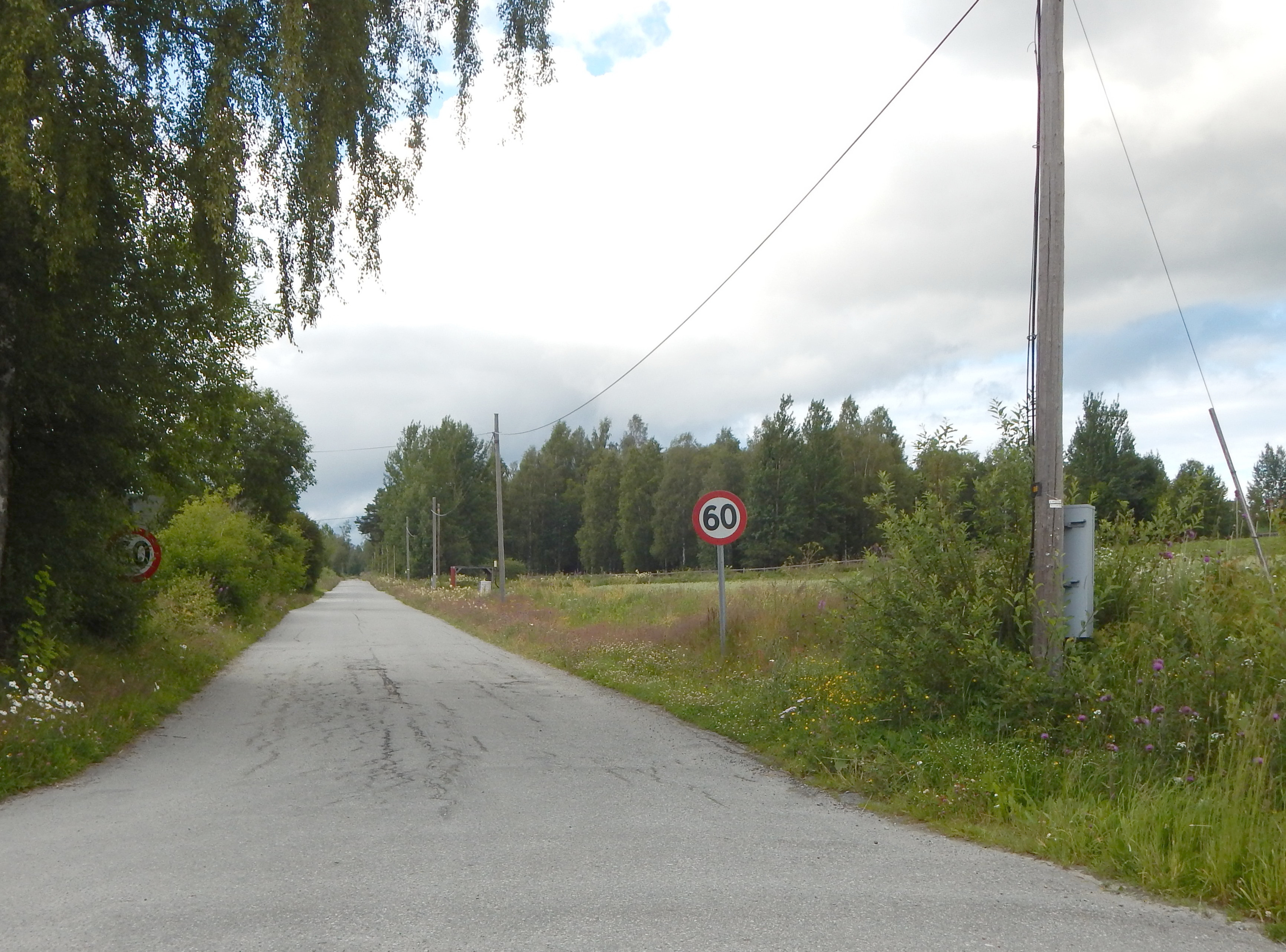 Øgardshøgda (fylkesvei 1922, tidl. 242)